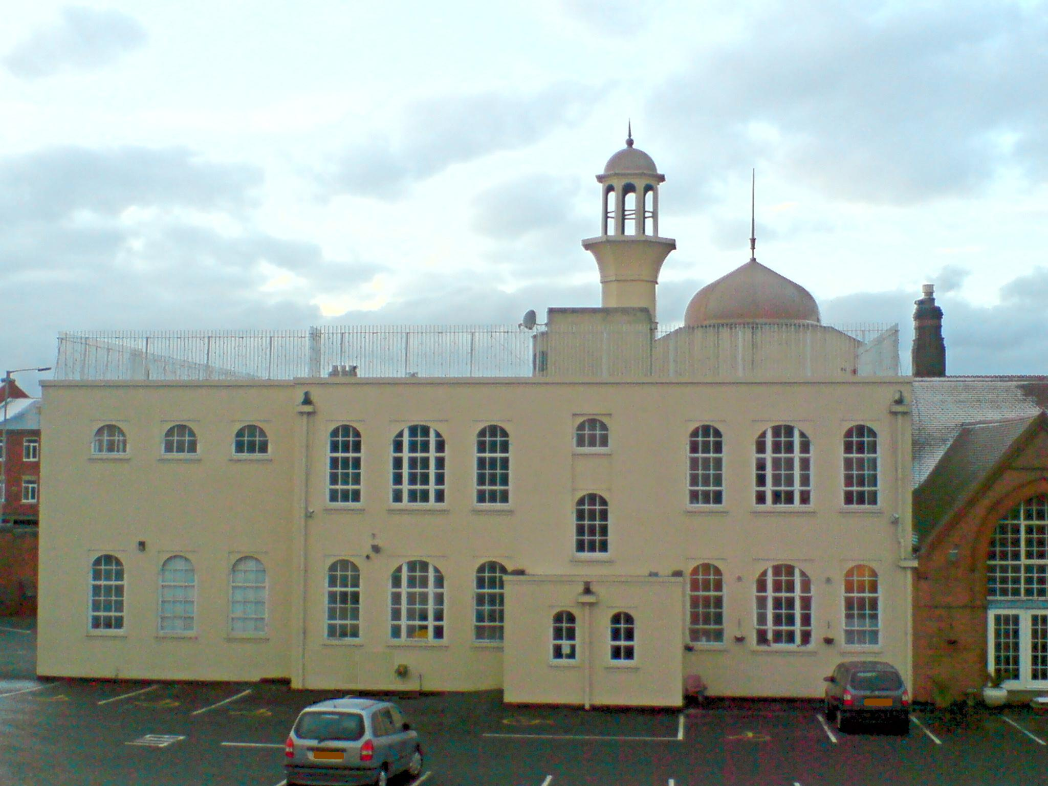 The Darul Barakaat Mosque in Birmingham